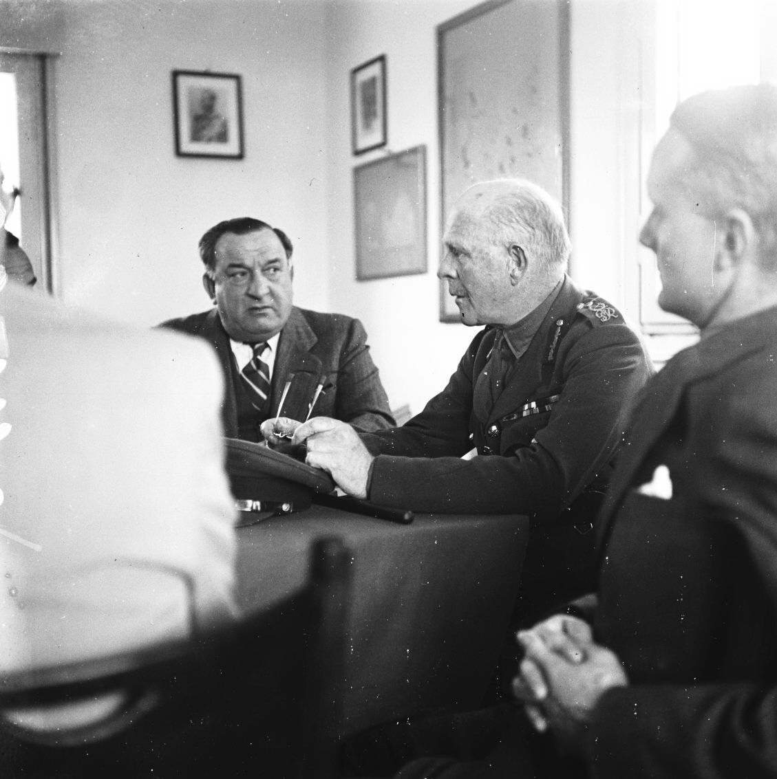 אוסף צילומים של הצלם זולטן קלוגר טווח מספרי התשלילים 24321 - 24359: הנציב העליון הלורד גורט בביקור ברמת גן